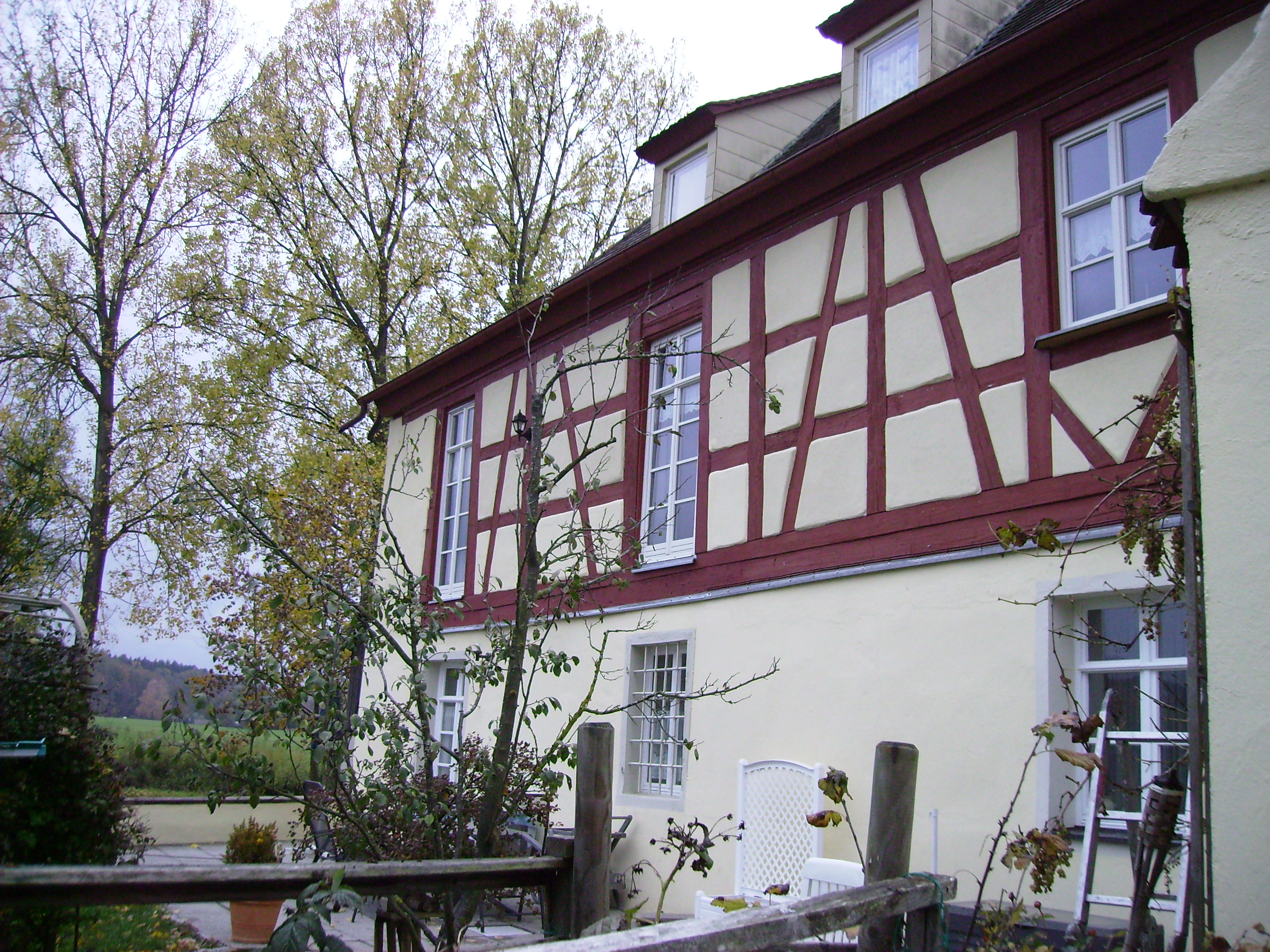 Stadtmühle Wassertrüdingen Teilansicht